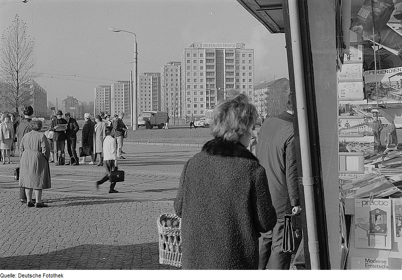 Original image description from the Deutsche FotothekDresden. Blick über den Postplatz nach Westen auf die Wohnbebauung Freiberger Straße